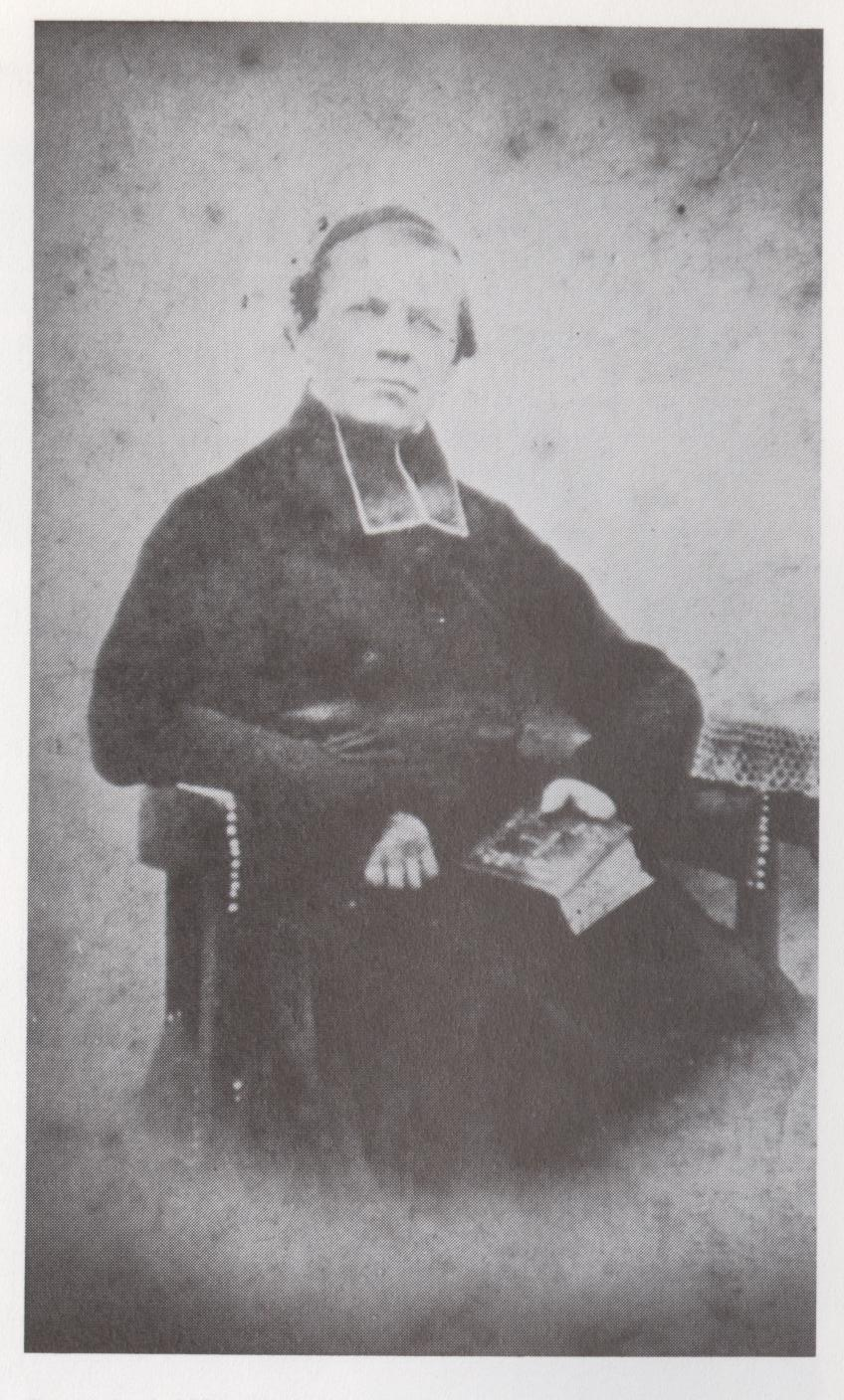 Pfarrer Ernst von Gagern, Diözese Speyer, Schifferstadt